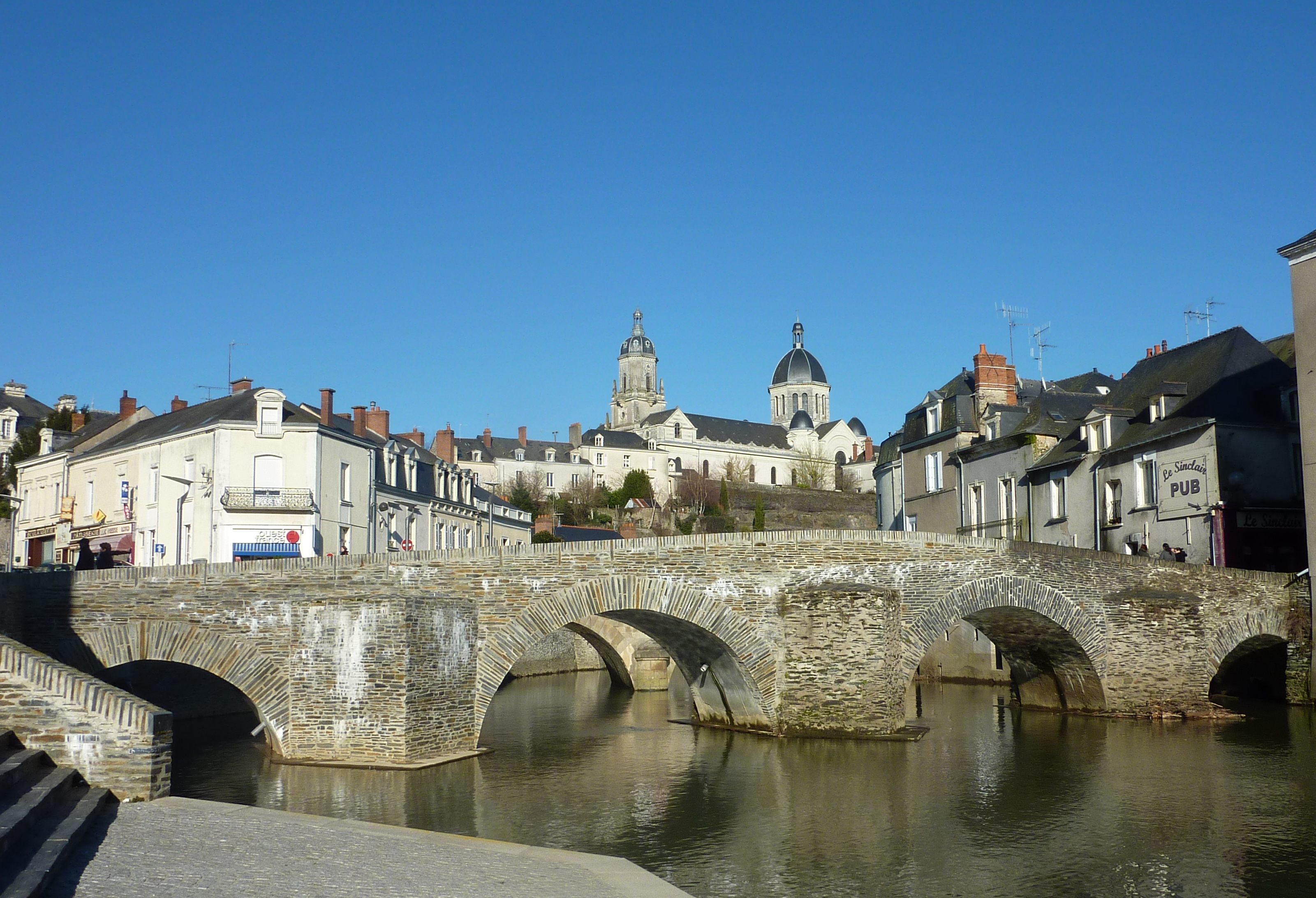 Vue d'ensemble avec l'Église Sainte Madeleine